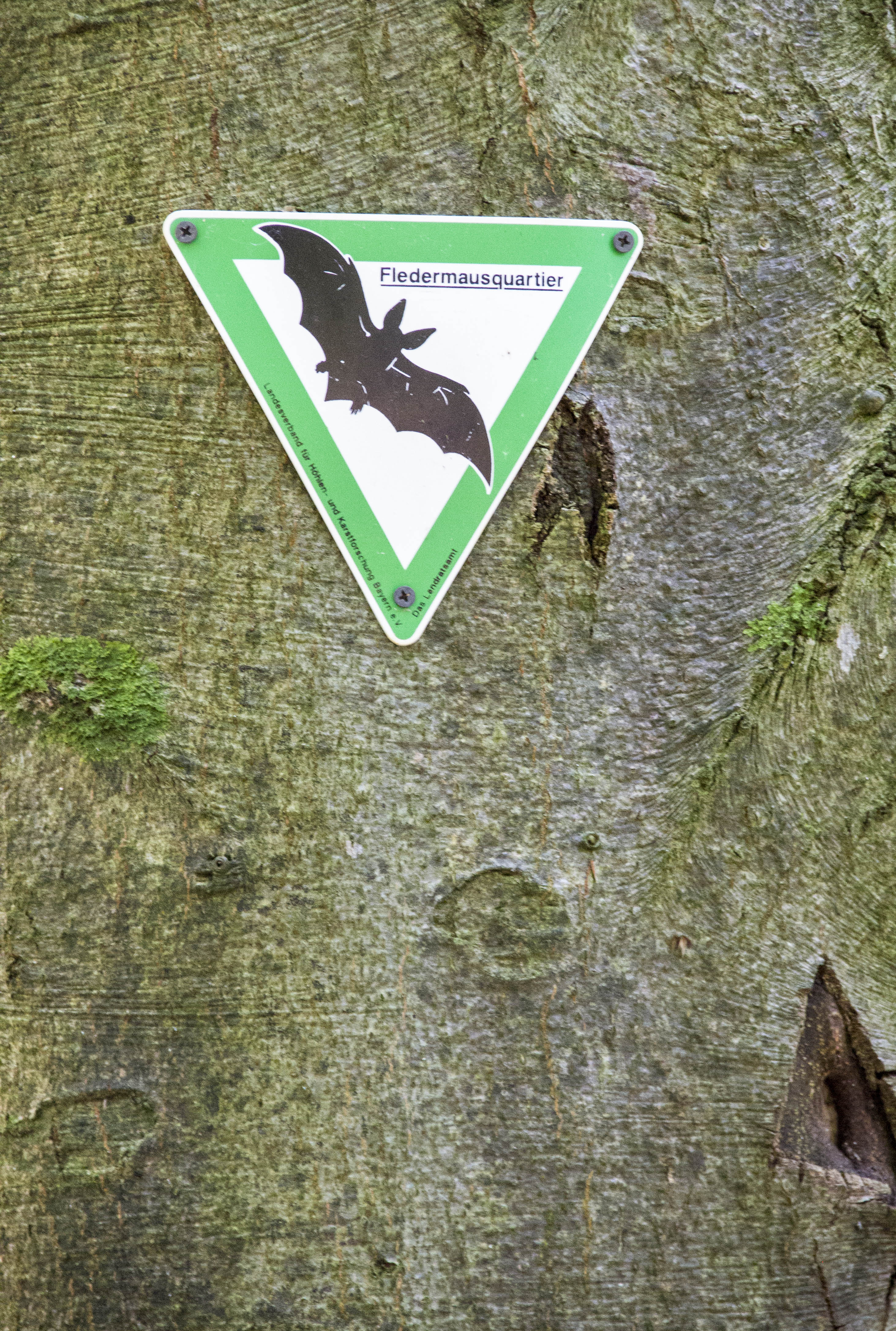 Schild, Fledermausschutz, Naturschutz